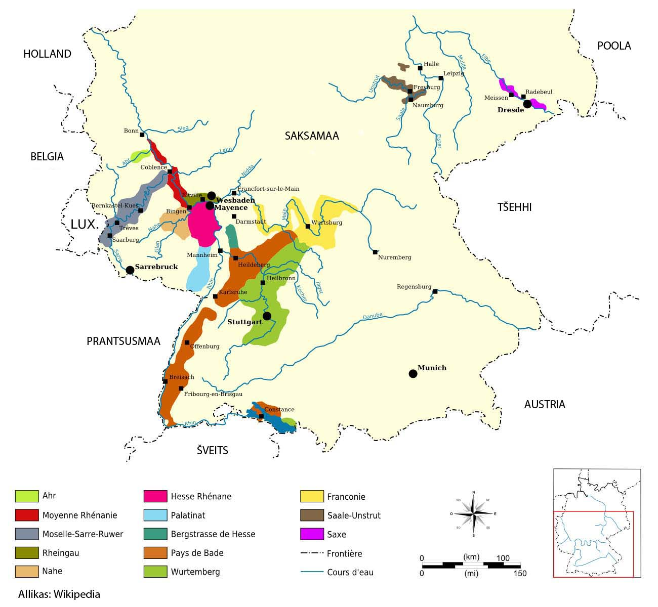 Saksamaa veinipiirkonnad.